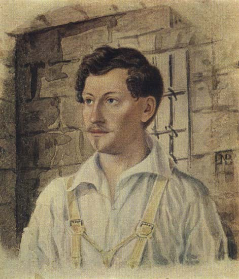 Акварельный портрет декабриста И. А. Анненкова, написанный Н. А. Бестужевым в Сибири в 1828 г.